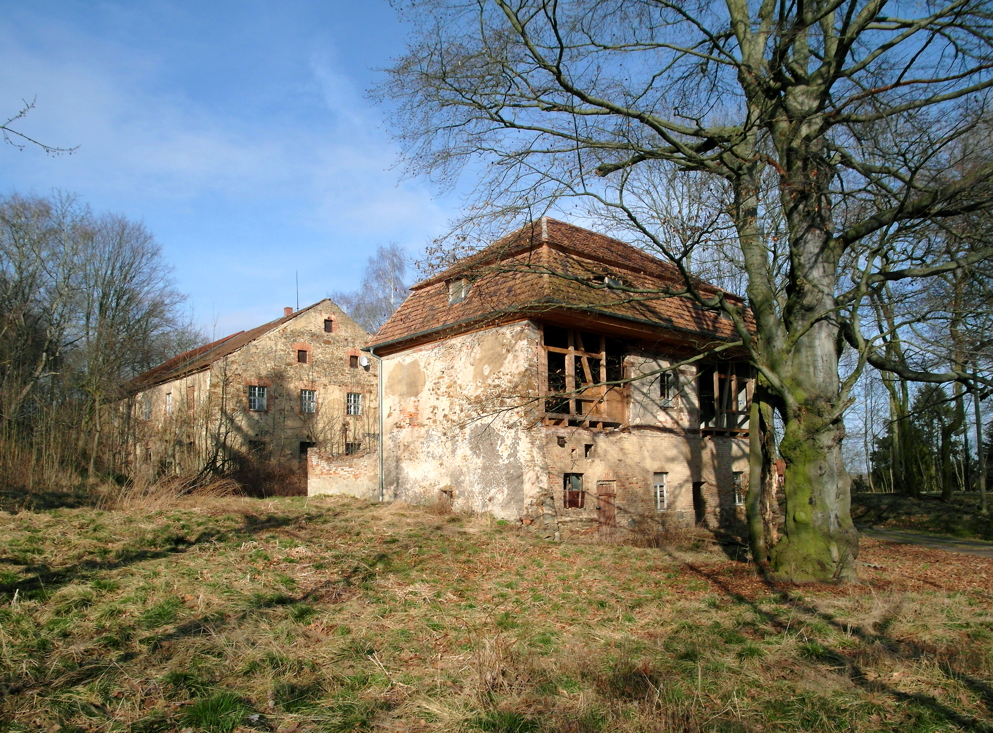 16.03.2017 02708 Unwürde (Löbau), Hofeweg: Rittergut Unwürde. Orangerie (GMP: 51.123829,14.674321) auf dem Areal des nach dem Brand 1930 abgerissenen Schlosses Unwürde, das hier im Bild gleich rechts stand (GMP: 51.123782,14.674851). [SAM8548.JPG]20170316510DR.JPG(c)Blobelt